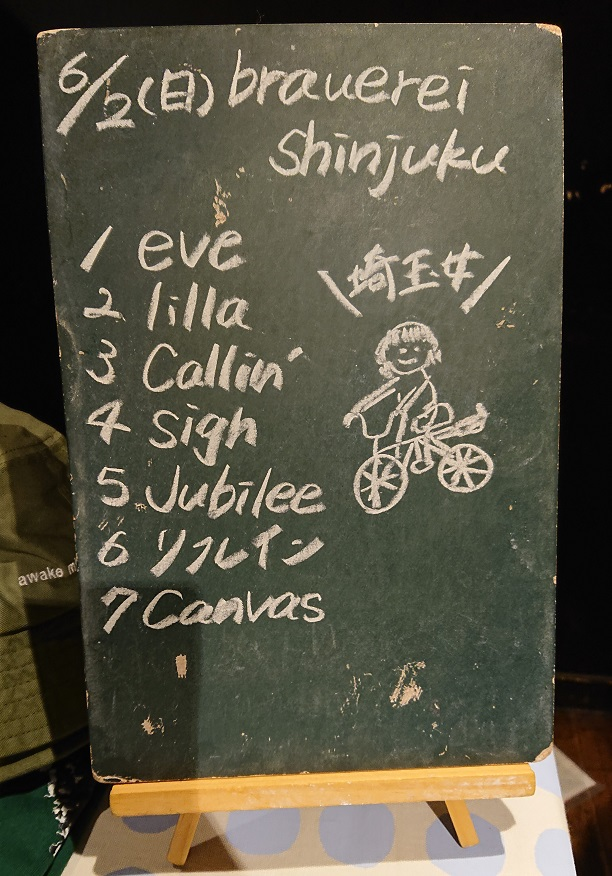 amiinAセトリボード